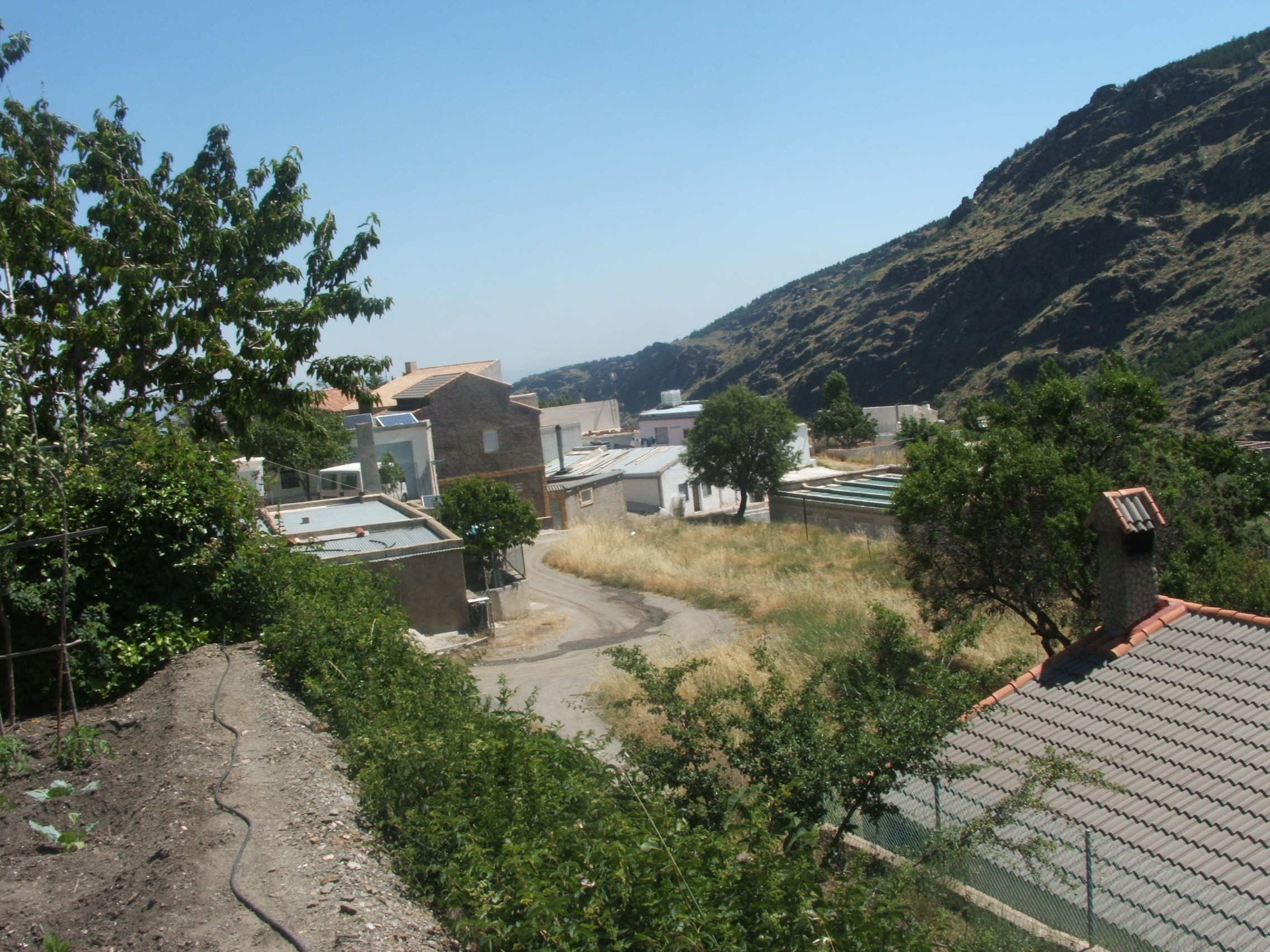 Los Santos (Alcóntar, Almería, España).